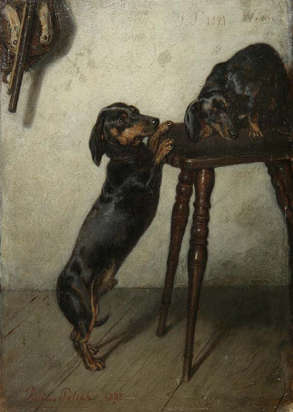 Paar Dachshunde auf einem Schemel.